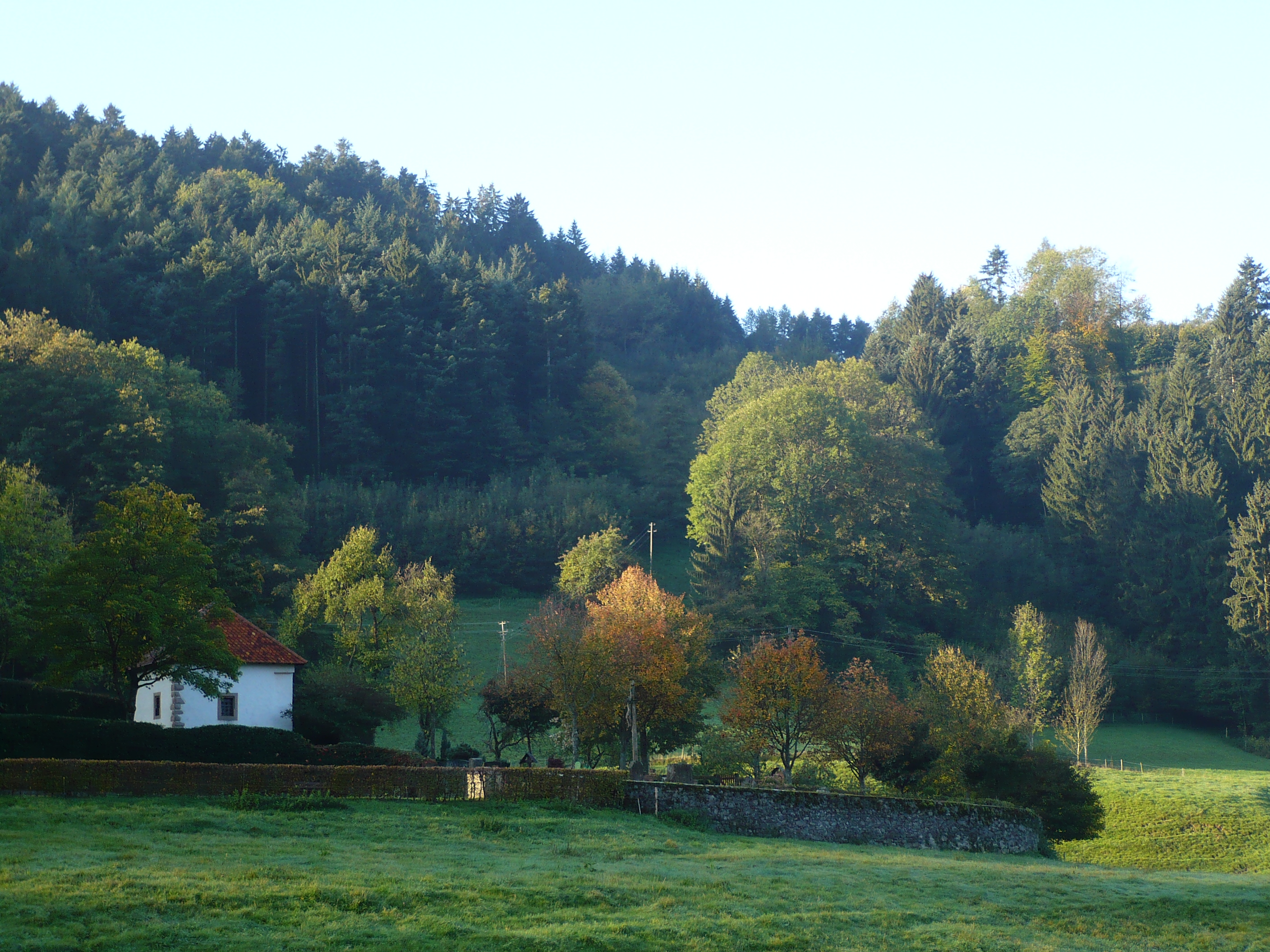 Blick auf den alten Friedhof von Suggental mit der Sakristei